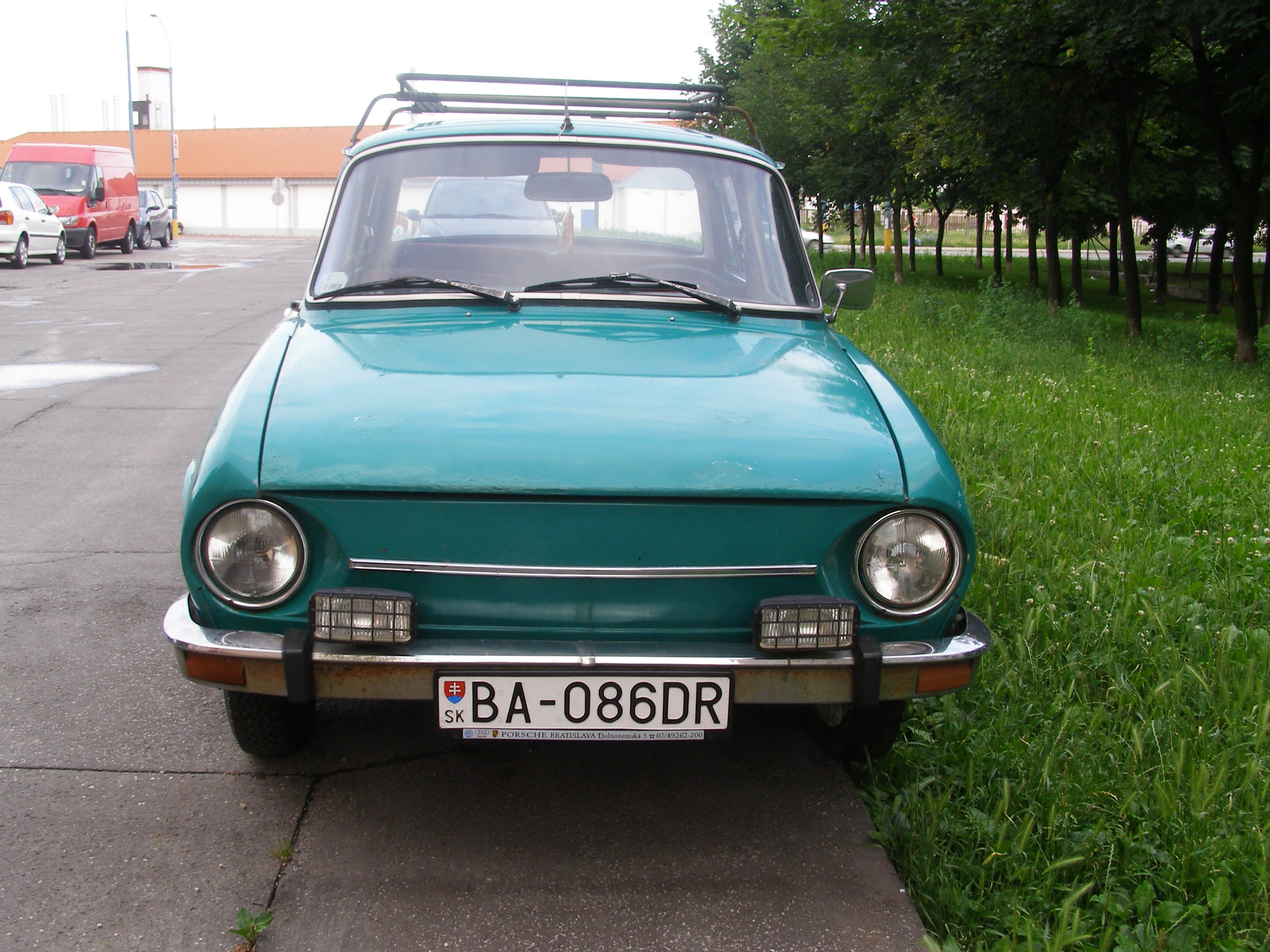 Škoda 100, Bratislava